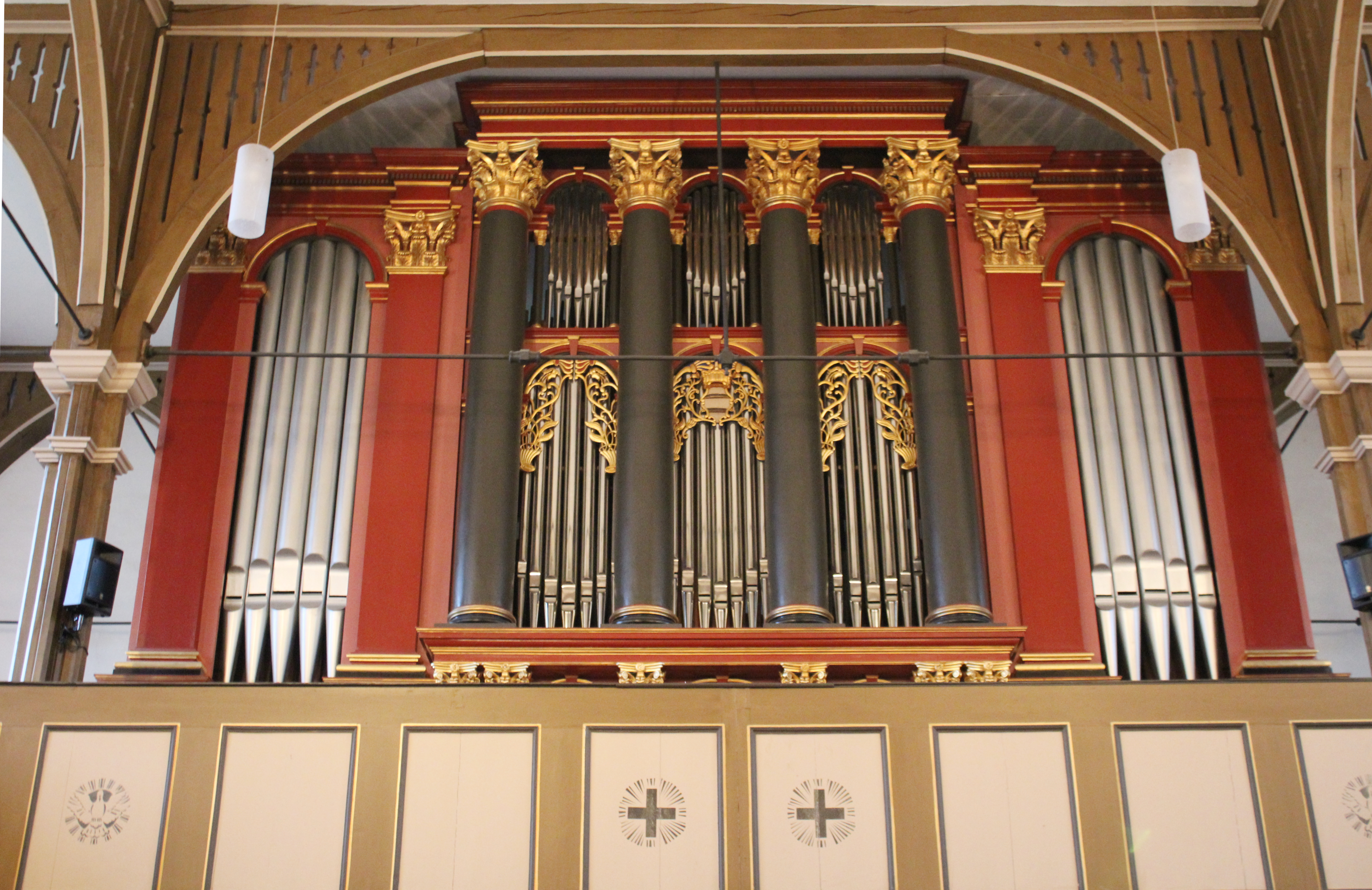 Evangelische Kirche Niedergründau, Gemeinde Gründau, Main-Kinzig-Kreis, Hessen, Deutschland